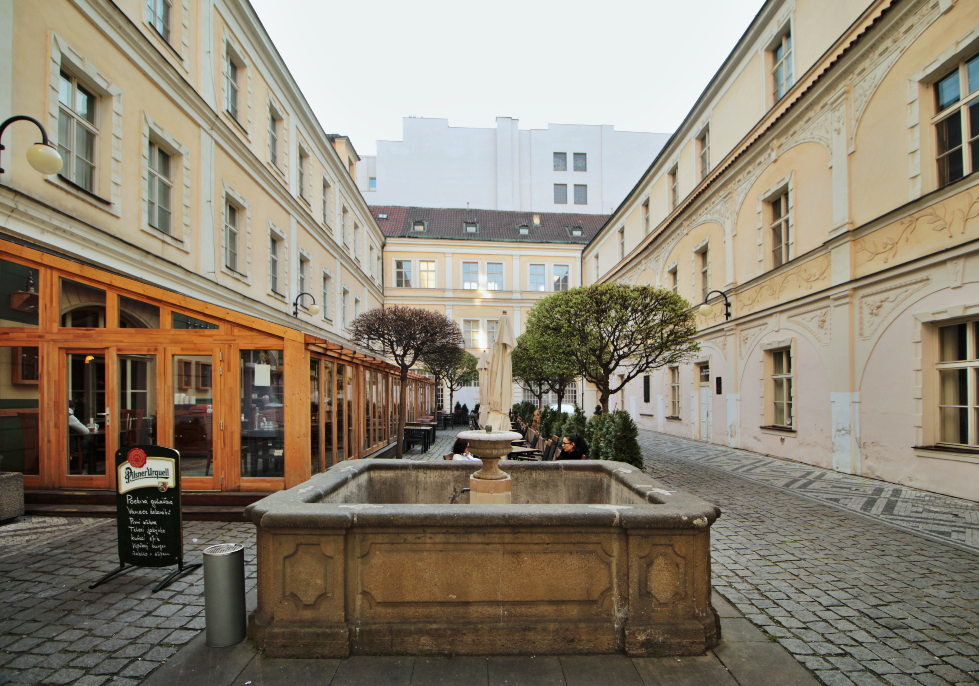 Praha-Hybernská ulice, Losyovský palác (též Lidový dům)